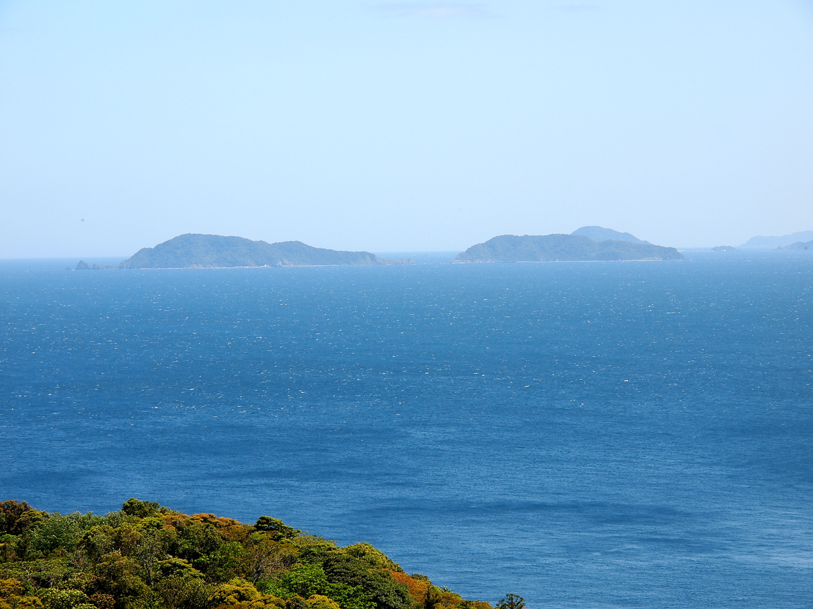 無垢島（大分県津久見市）